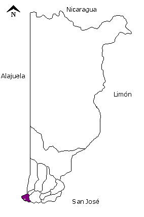 Mapa del cantón de Belén, provincia de Heredia, Costa Rica